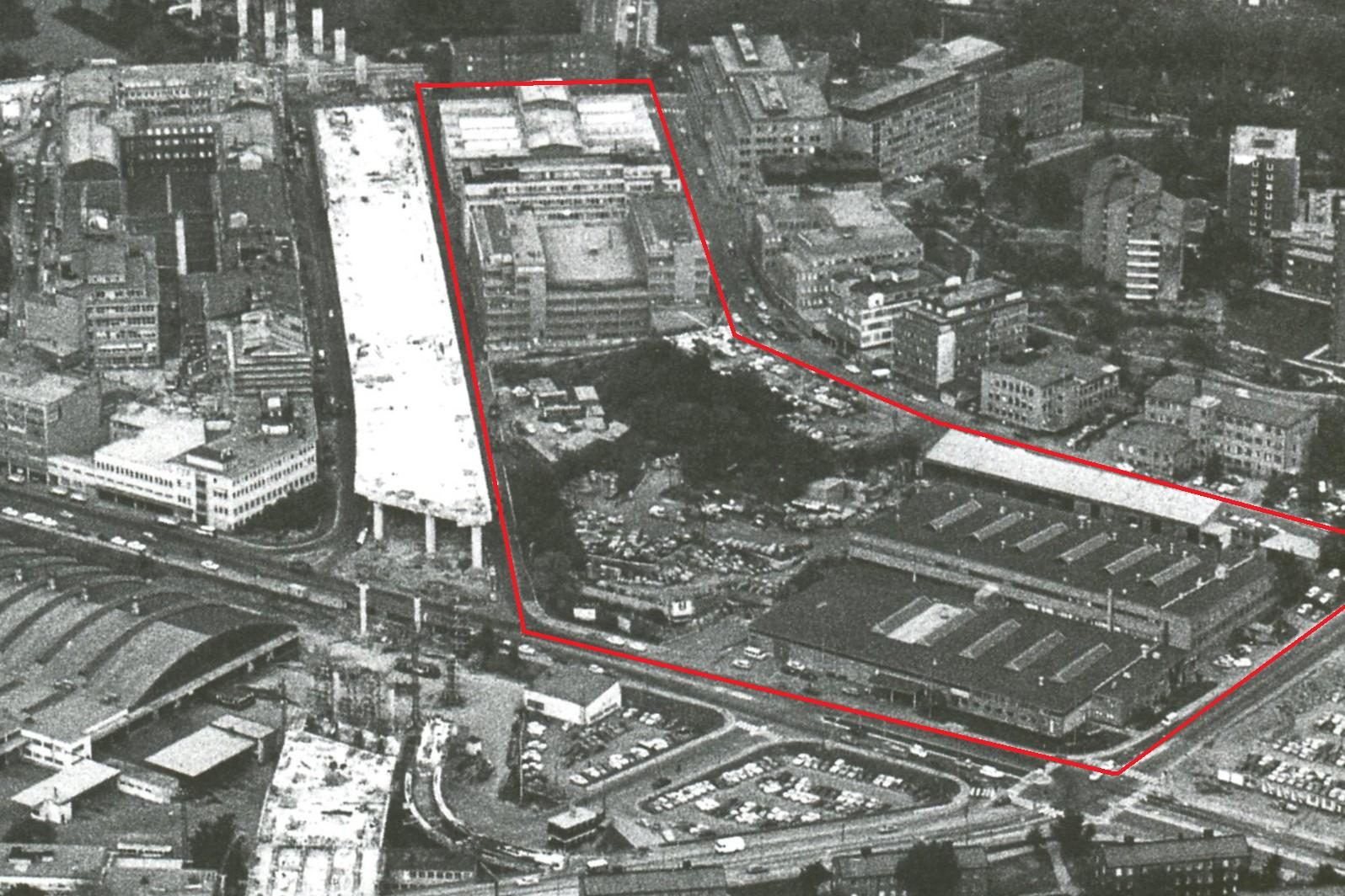 Essingeleden byggs genom Kristineberg i Stockholm med Hornsbergs strand i bakgrunden, kvarteret Lustgården inom röd ram.